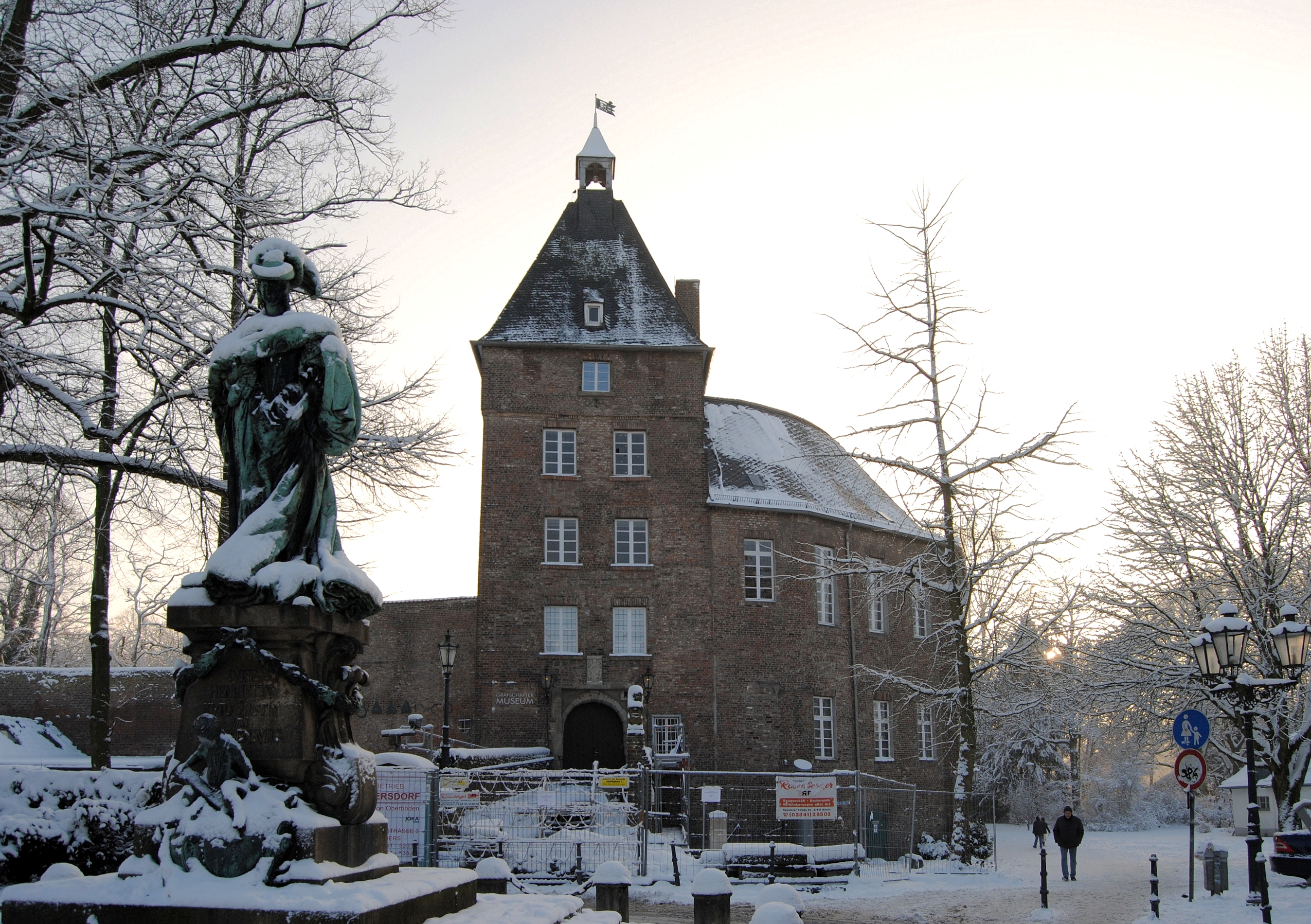 Das Moerser Schloss während des Sonnenuntergangs an einem winterlichen Dezember-Tag